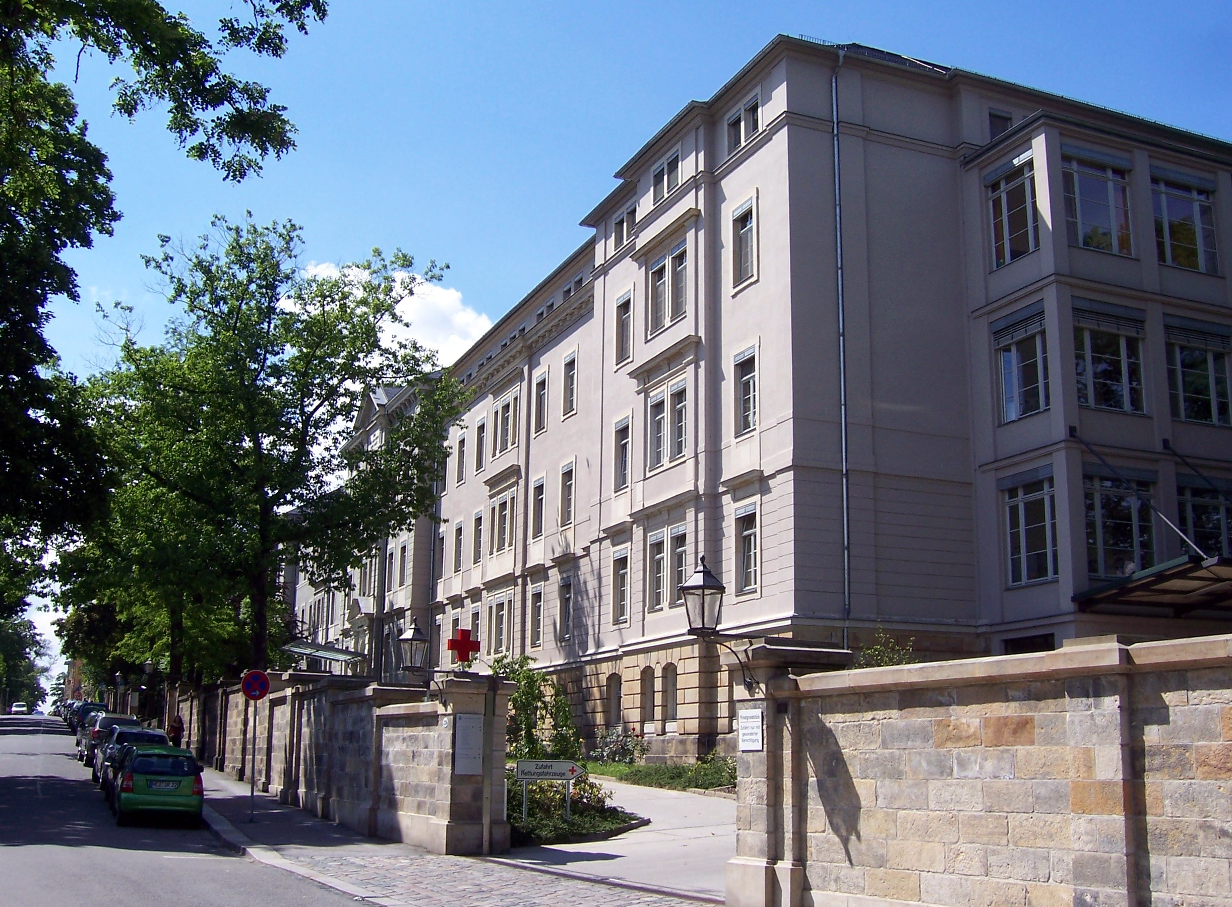 Eingang zur Diakonissenanstalt in Dresden.